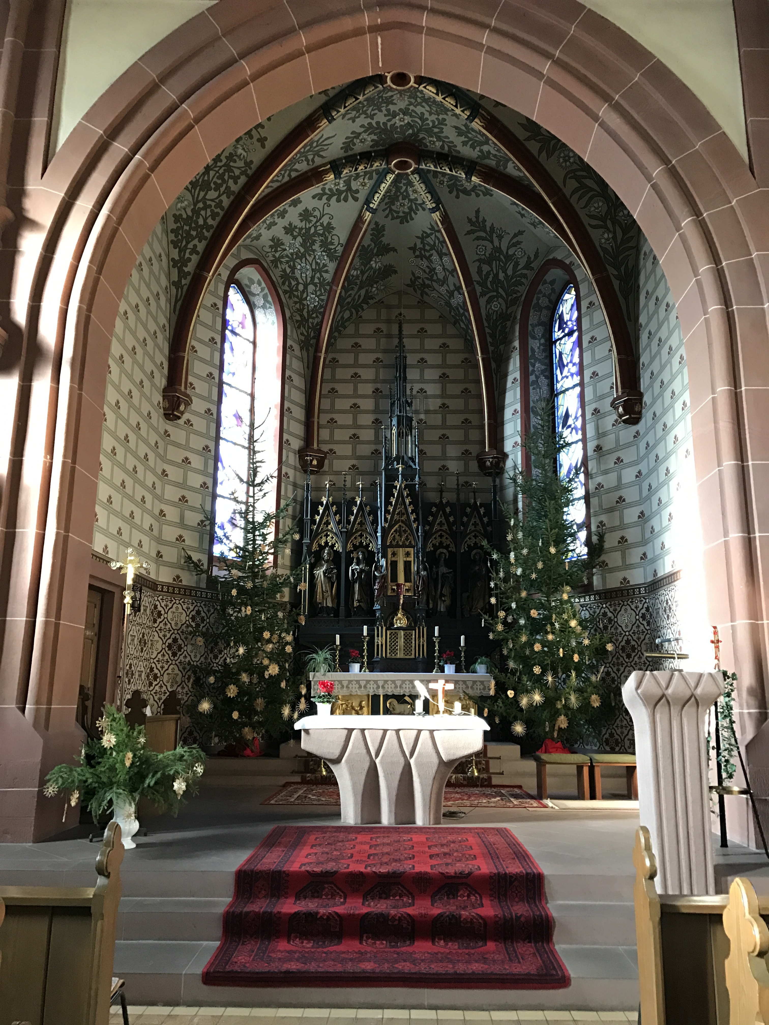 Die Martinskirche in Gamburg im Main-Tauber-Kreis.